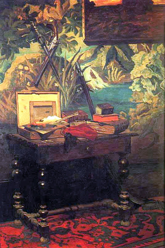 Coin d'atelier, Museu de Orsay